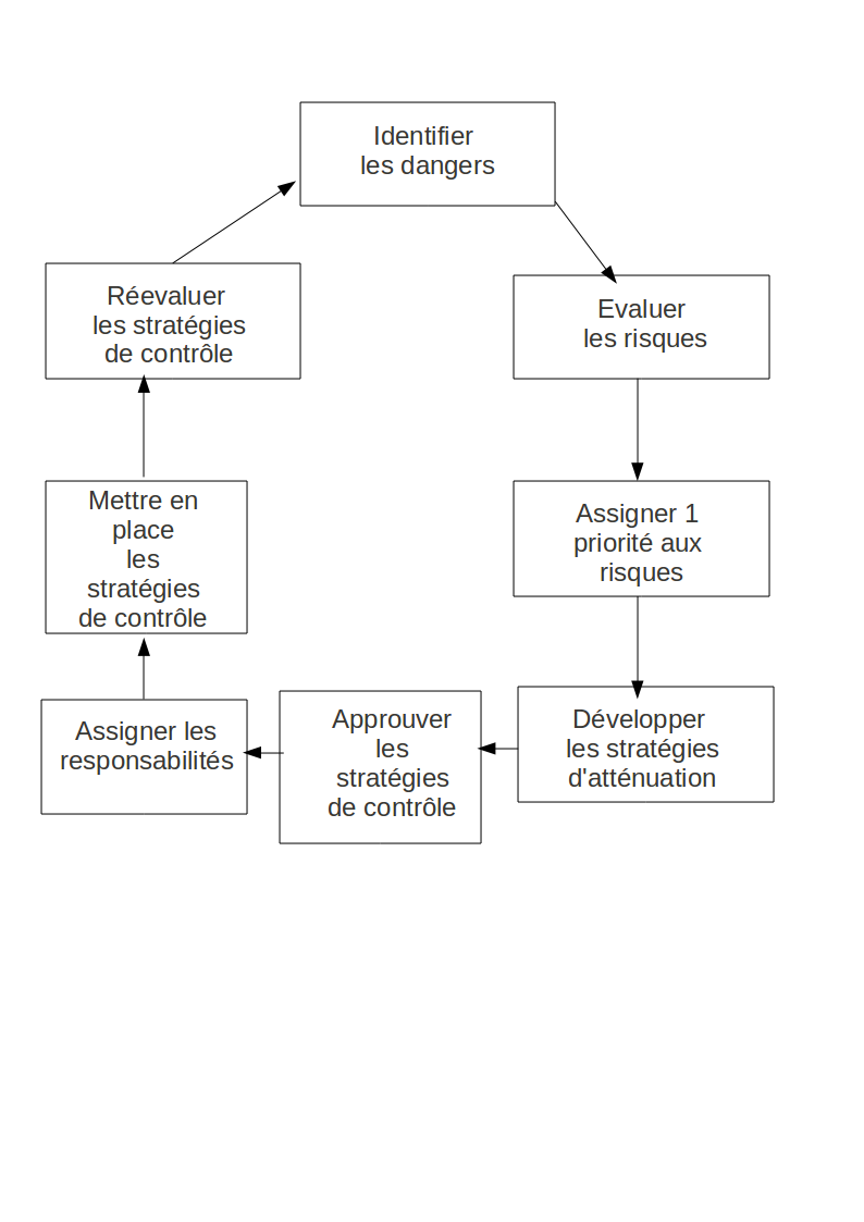 Description de la boucle de gestion de la sécurité